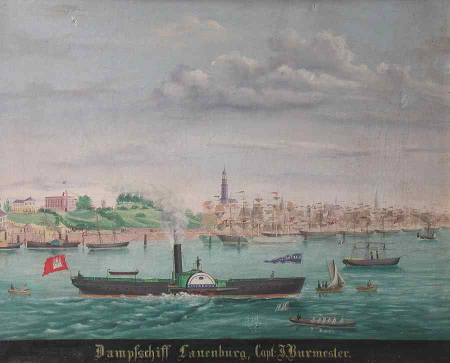 Dampfschiff Lauenburg des Kapitän J. Burmester in Hamburg, Öl auf Leinwand